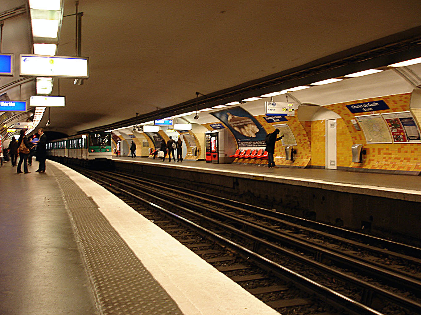 Station Etoile, de la ligne 2 du métro de Paris, France.